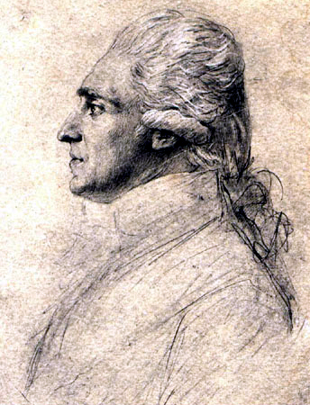 Portrait of Jean-Baptiste-Donatien de Vimeur, comte de Rochambeau (1725-1807)